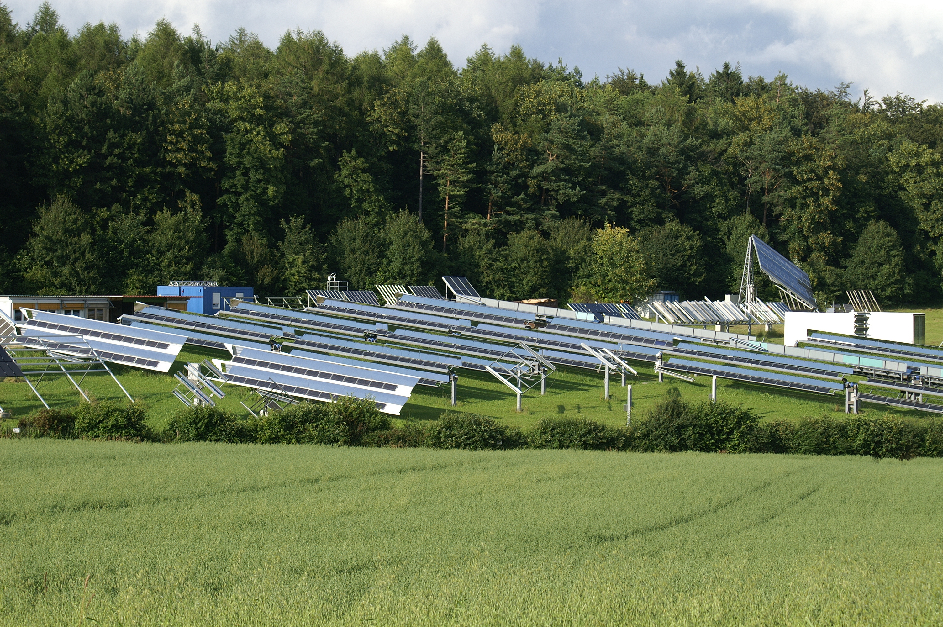 Solar-Testfeld Widderstall des Zentrums für Sonnenenergie- und Wasserstoff-Forschung Baden-Württemberg